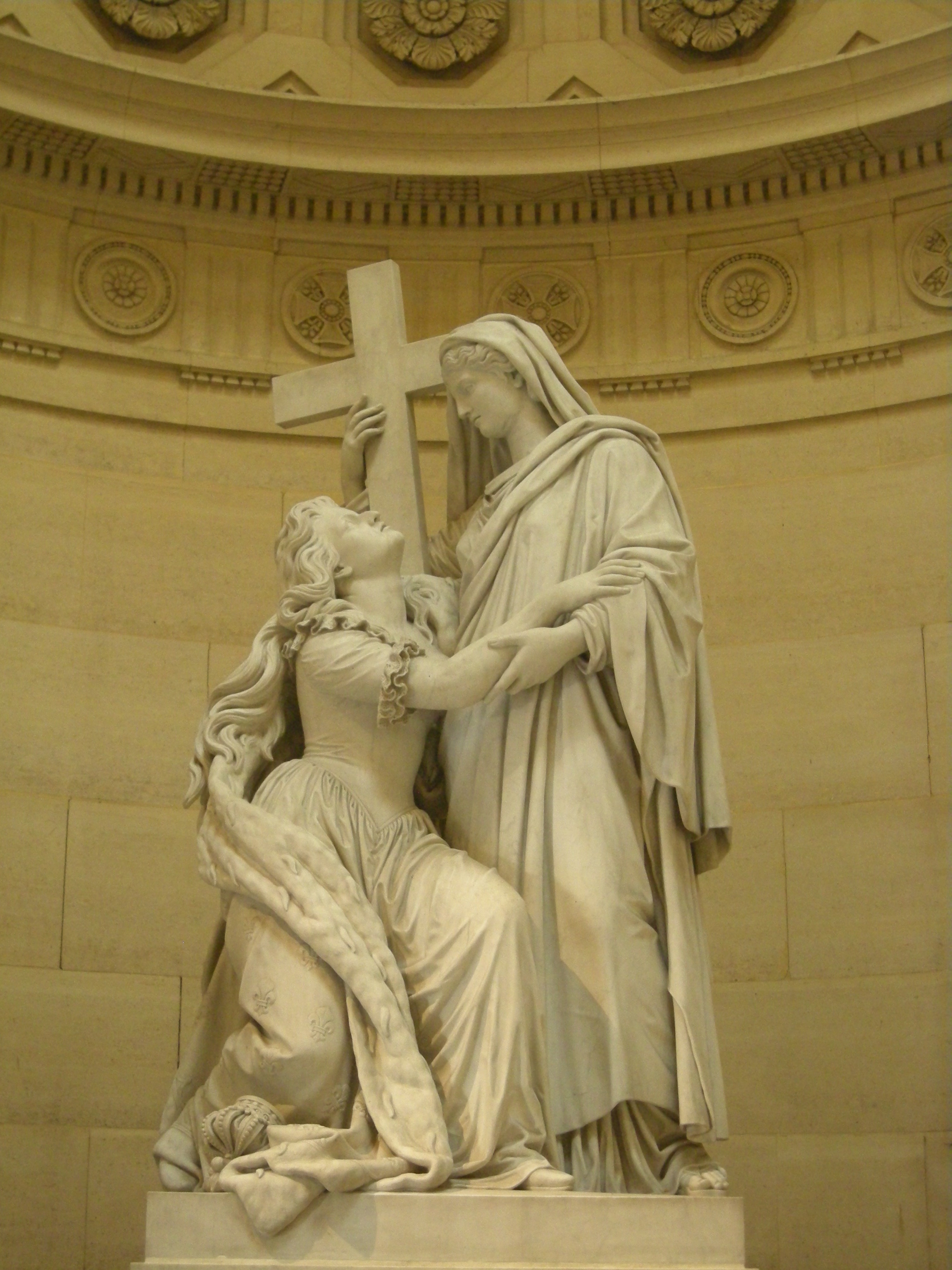 Chapelle expiatoire, Paris, France.